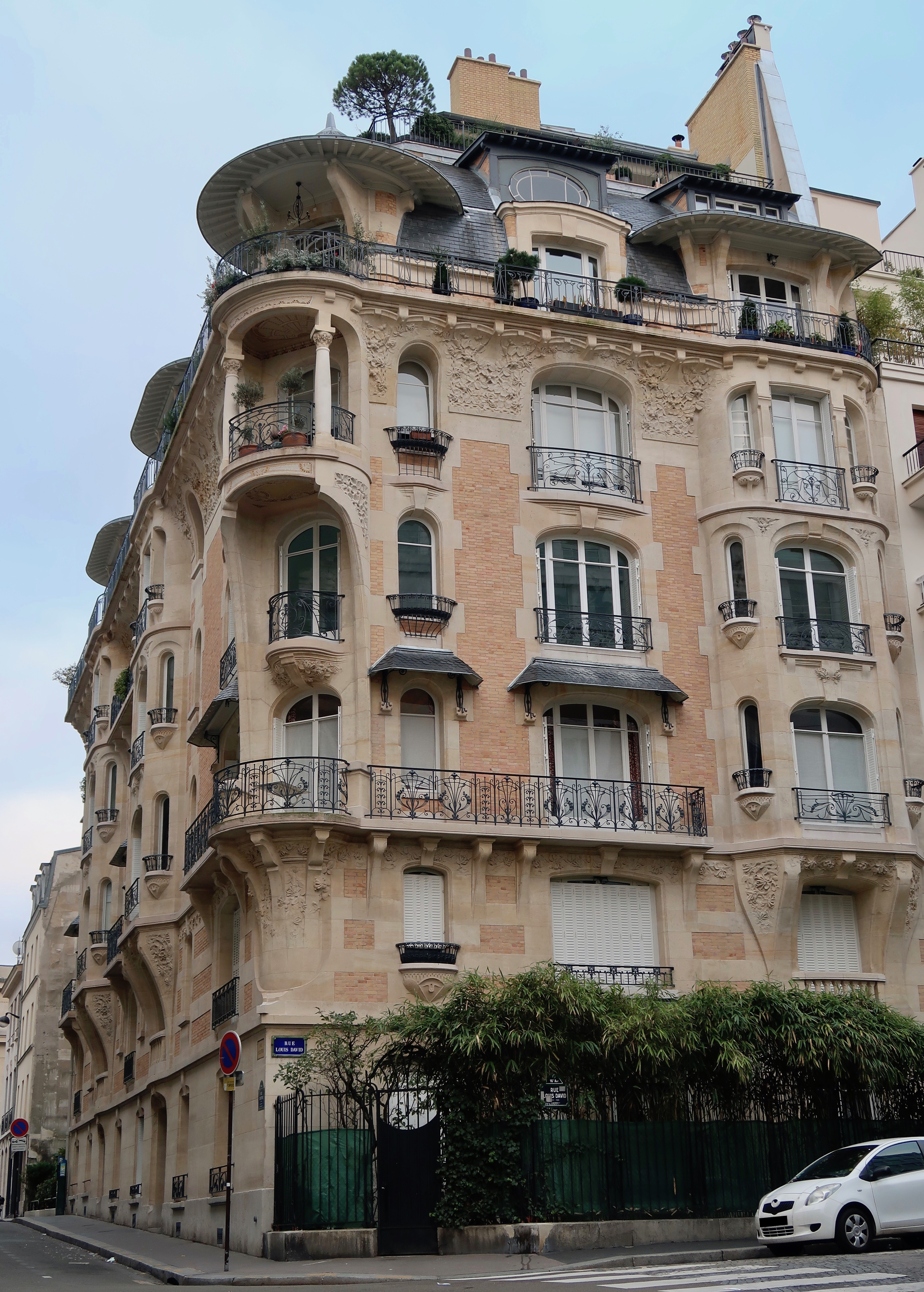 39 rue Scheffer, au croisement avec la rue Louis-David (Paris, 16e).